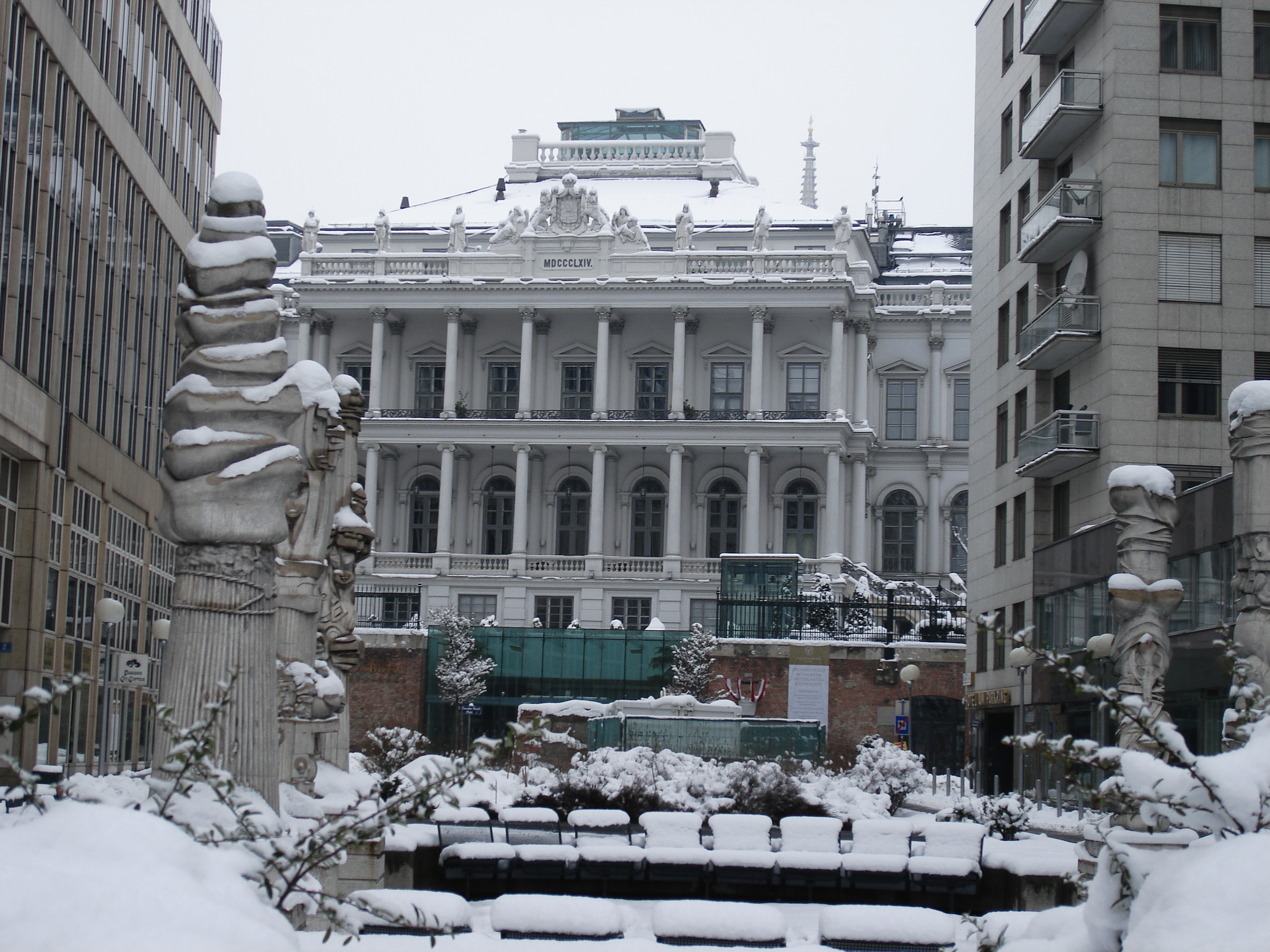 Wien im Winter 2013 - Theodor-Herzl-Plaz